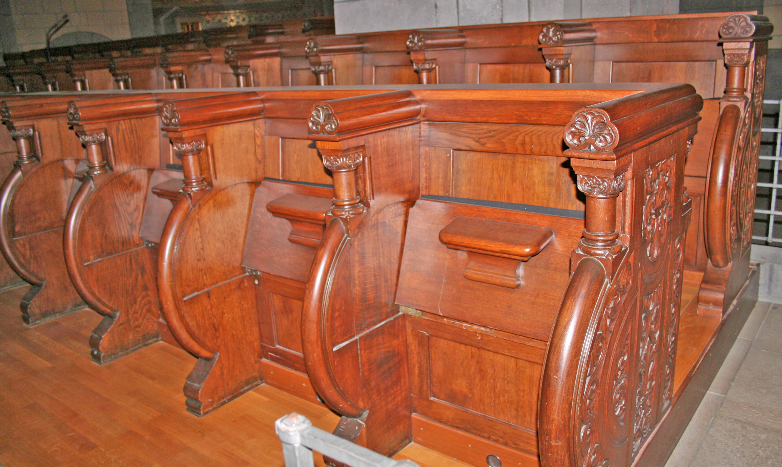 Ställercher aus der Abteikierch Maria Laach.